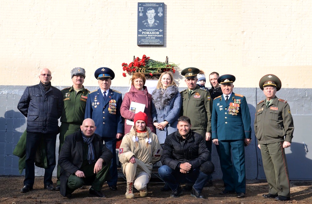 Открытие доски Романову в г.Коломна